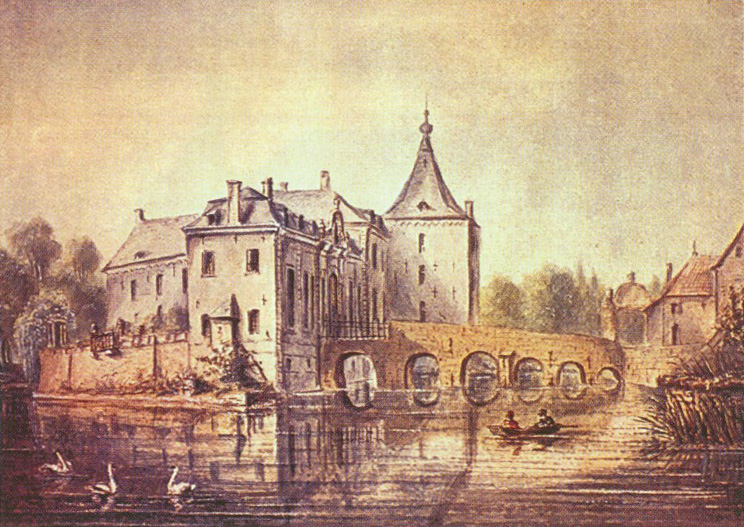 Aqurell mit einer Abbildung des Schlosses Genhoes in Alt-Valkenburg